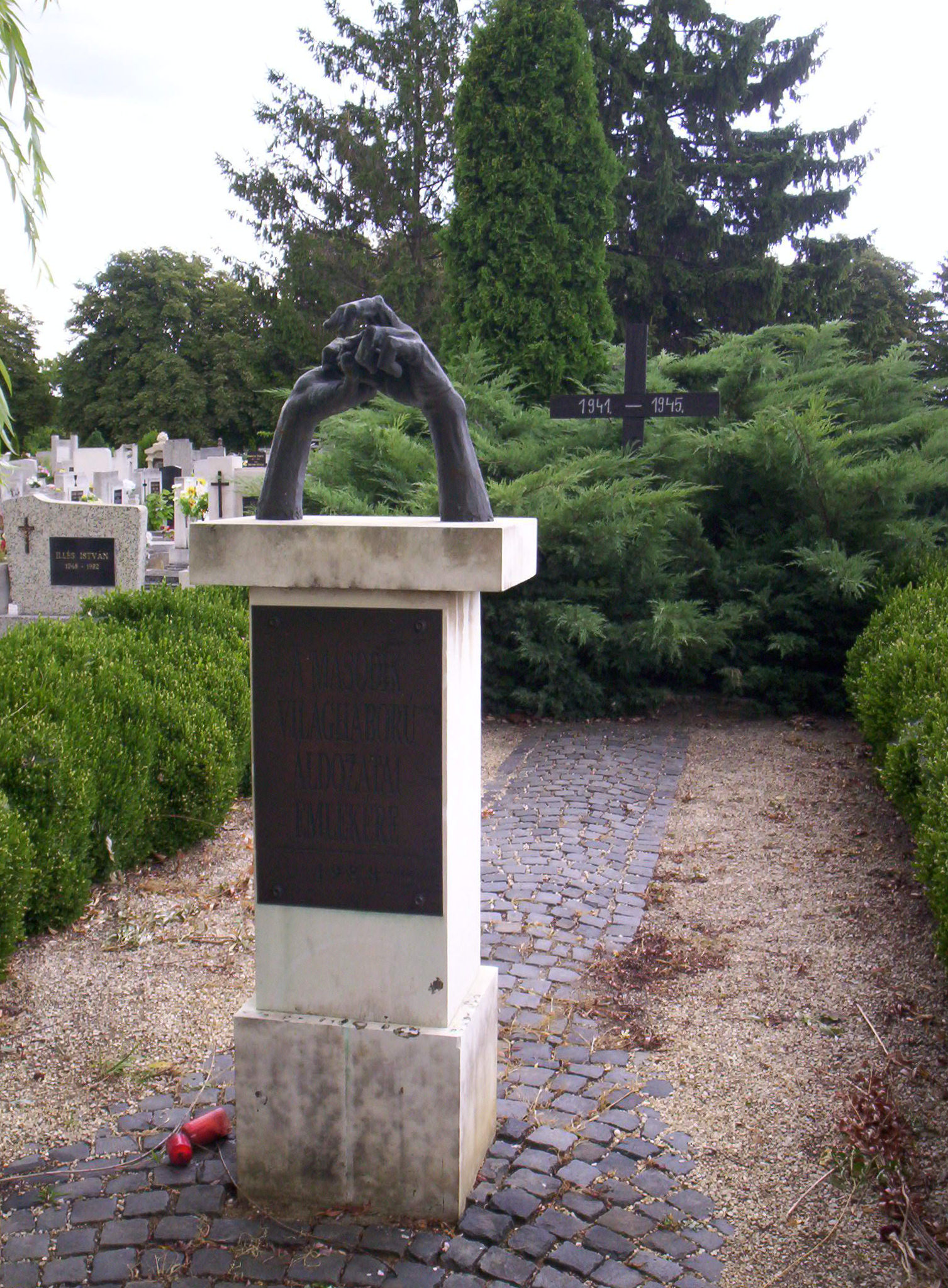 Memorial of the victims of the World War II in the Alsóvárosi cemetery, Pápa, Hungary. Art by László Marton, inaugurated in 1988.A második világháború áldozatainak emlékműve a pápai Alsóvárosi temetőben. Marton László műve, 1988-ban avatták fel.